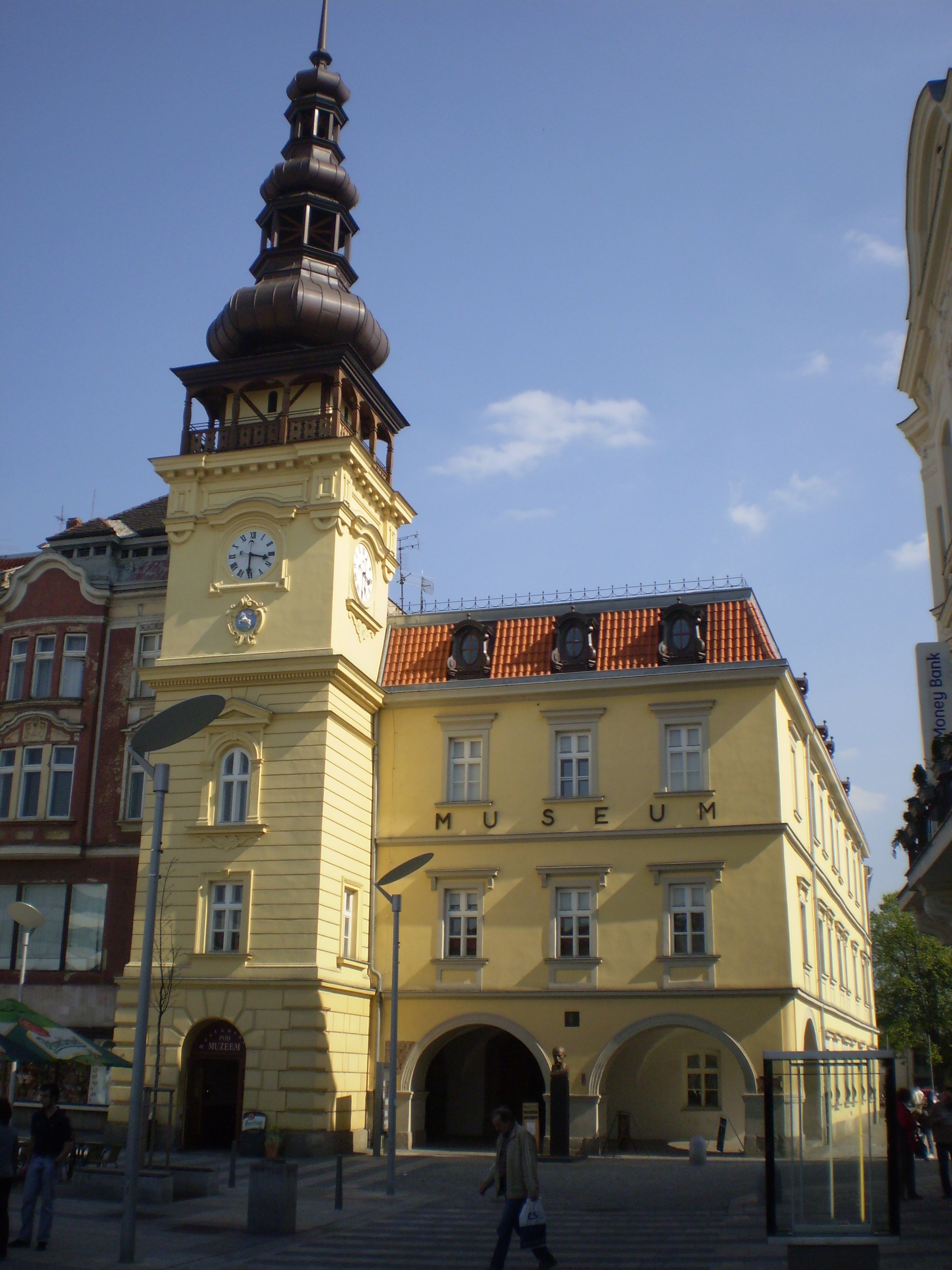 Stará radnice (dnešní muzeum) na Masarykově náměstí v Ostravě.